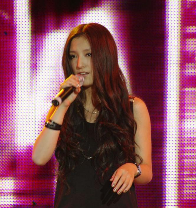 快女广州巡演